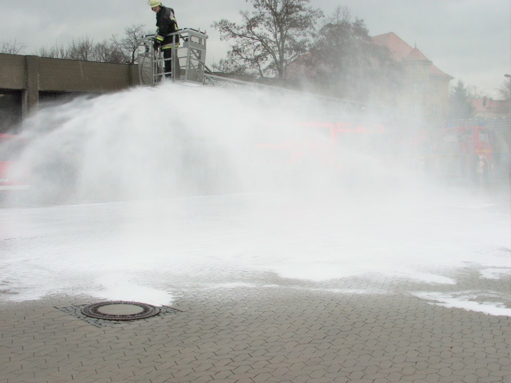 Spezialrohr für Sondierungsöffnungen in schwer zugänglichen Räumen